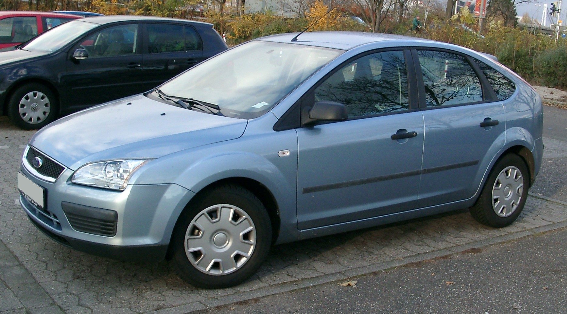 Ford Focus, 2. Generation